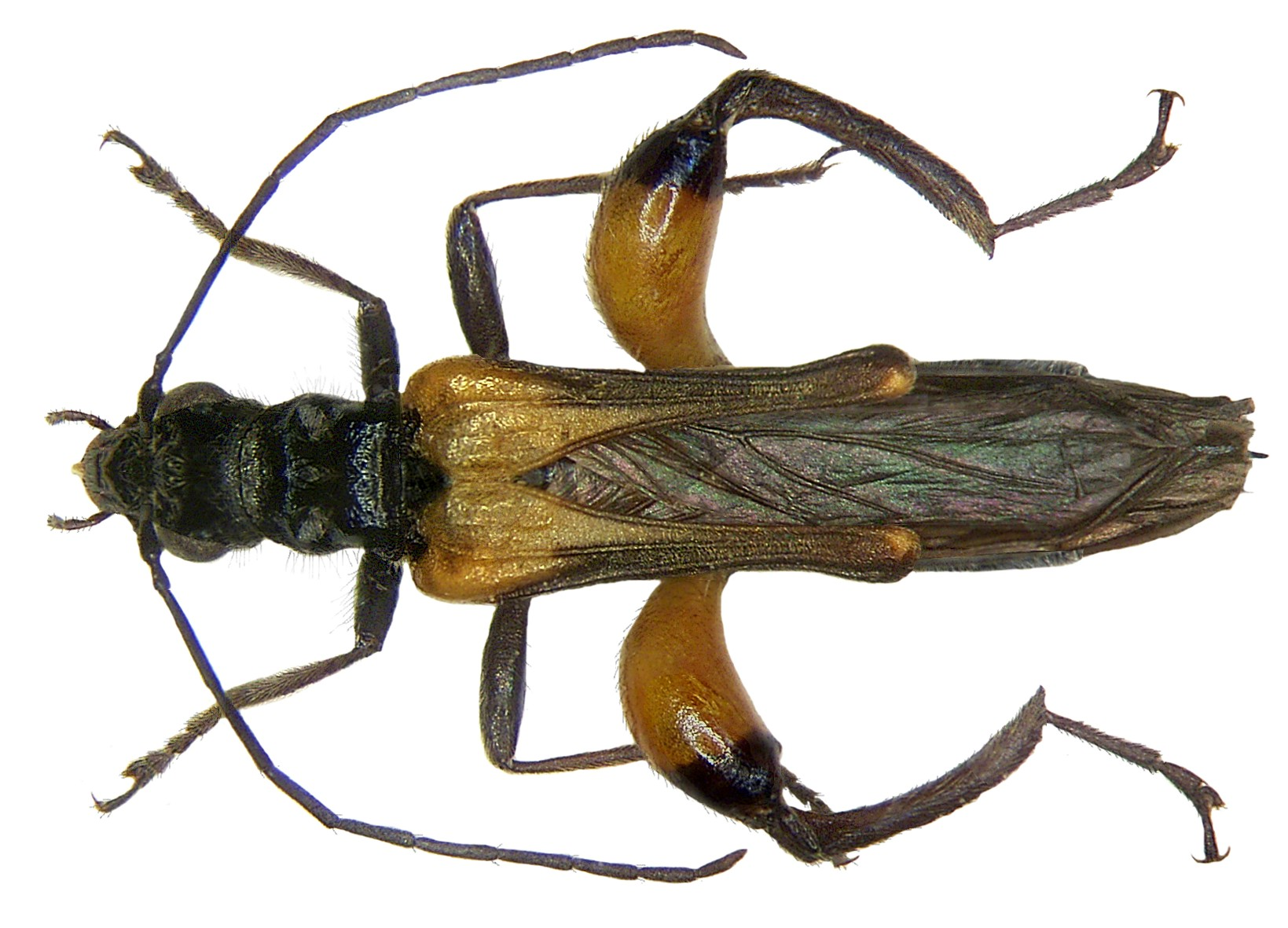 Familie: Oedemeridae Grösse: 9,5 mm Verbreitung: Europa Fundort: Türkei, Marmaris, Hisarönü leg. U.Schmidt, 1997; det. A.Skale Foto: U.Schmidt, 2007